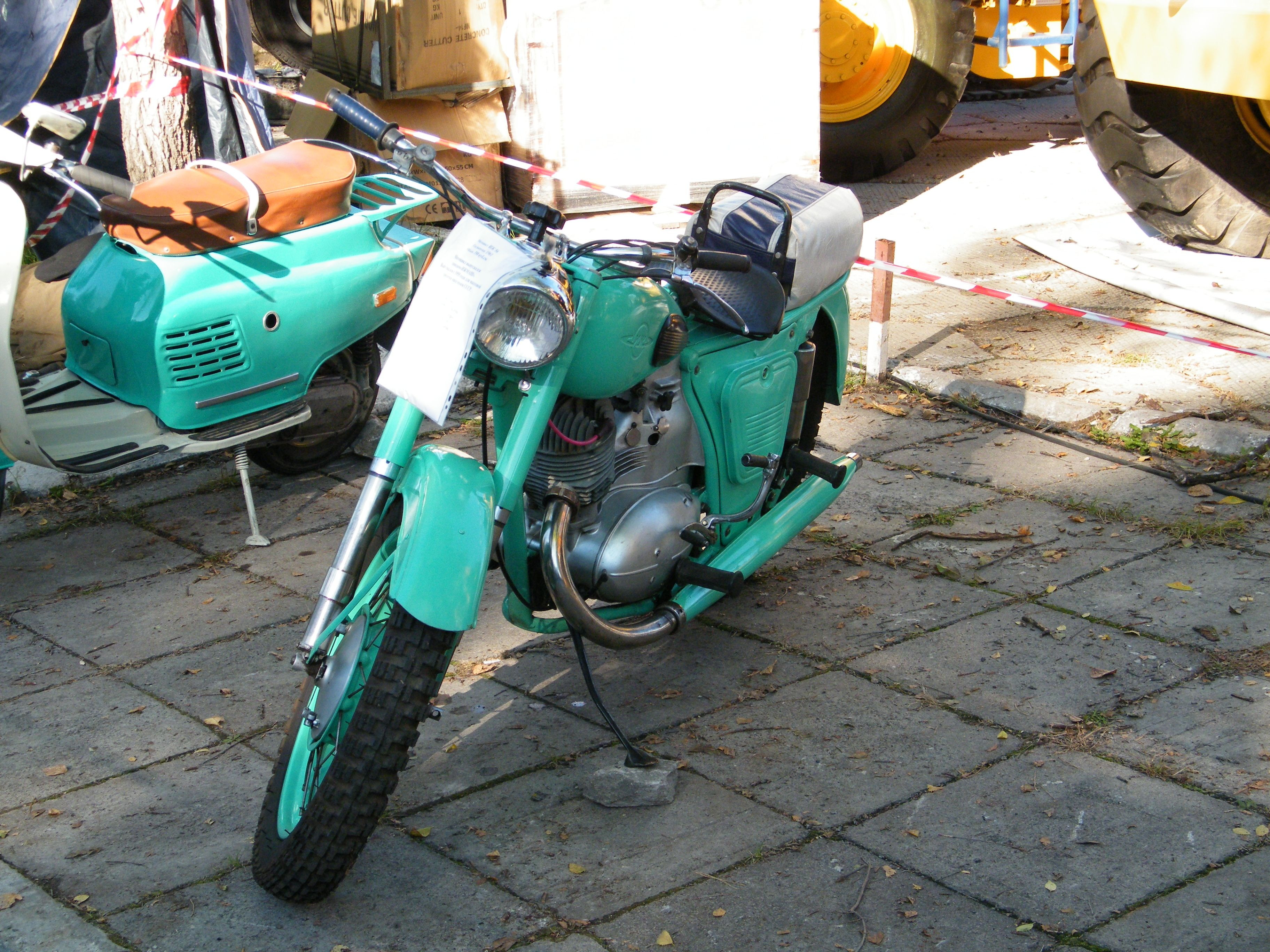 Мотоцикл ИЖ-56